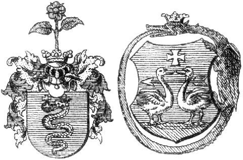 Famille hongroise BETHLEN : blason des branches "iktari" et "bethleni". De lEncyclopédie Pallas, 1893-1897